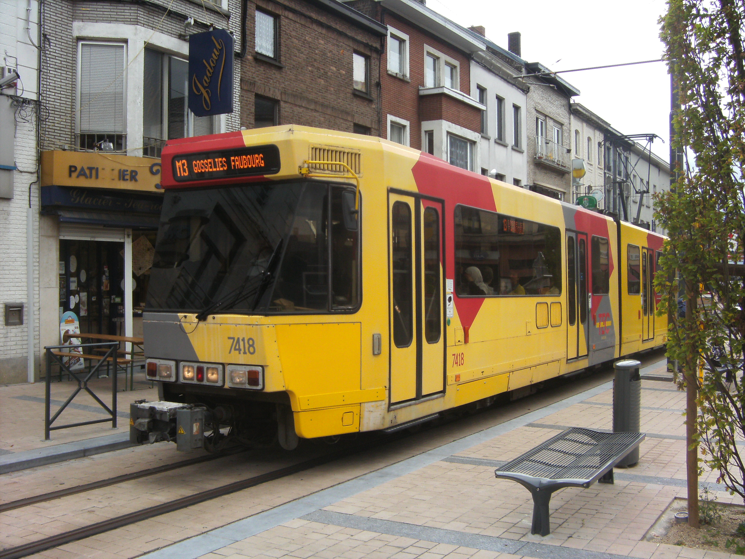 Métro léger de Charleroi - ligne M3 - Traversée de Gosselies